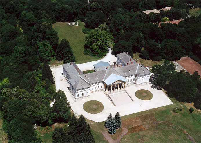 Palace - Dég - Hungary - Europe